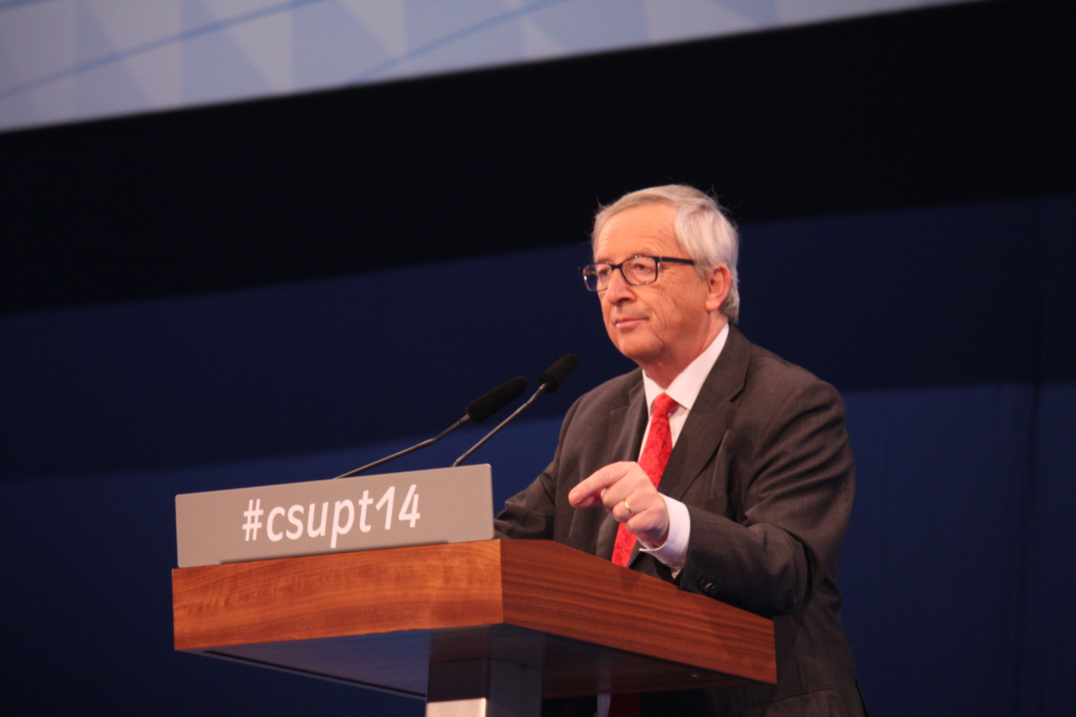 Jean-Claude Juncker auf dem CSU-Parteitag am 12. Dezember 2014 in Nürnberg